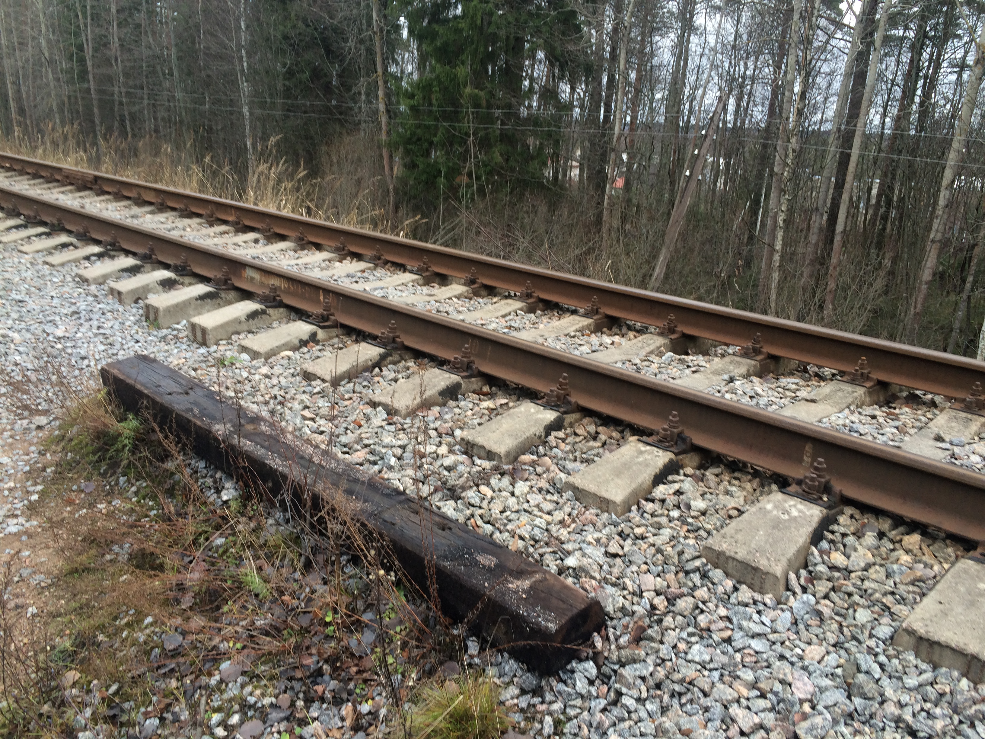 пл. Тайкина